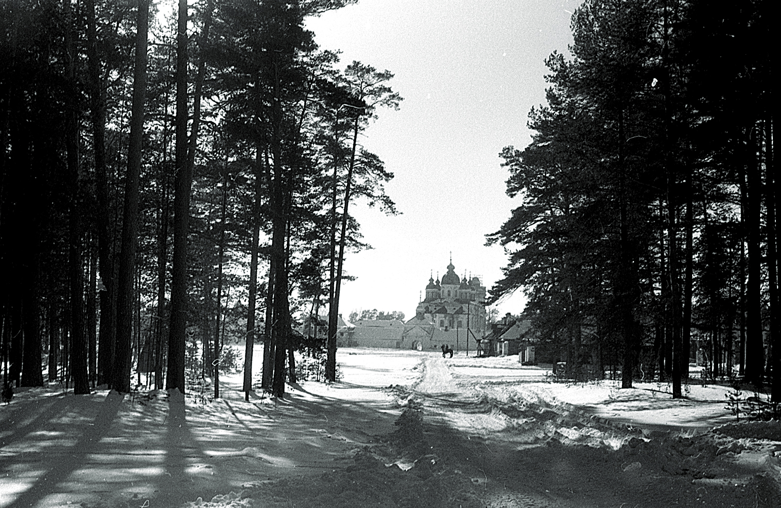 Коневский монастырь зимой.